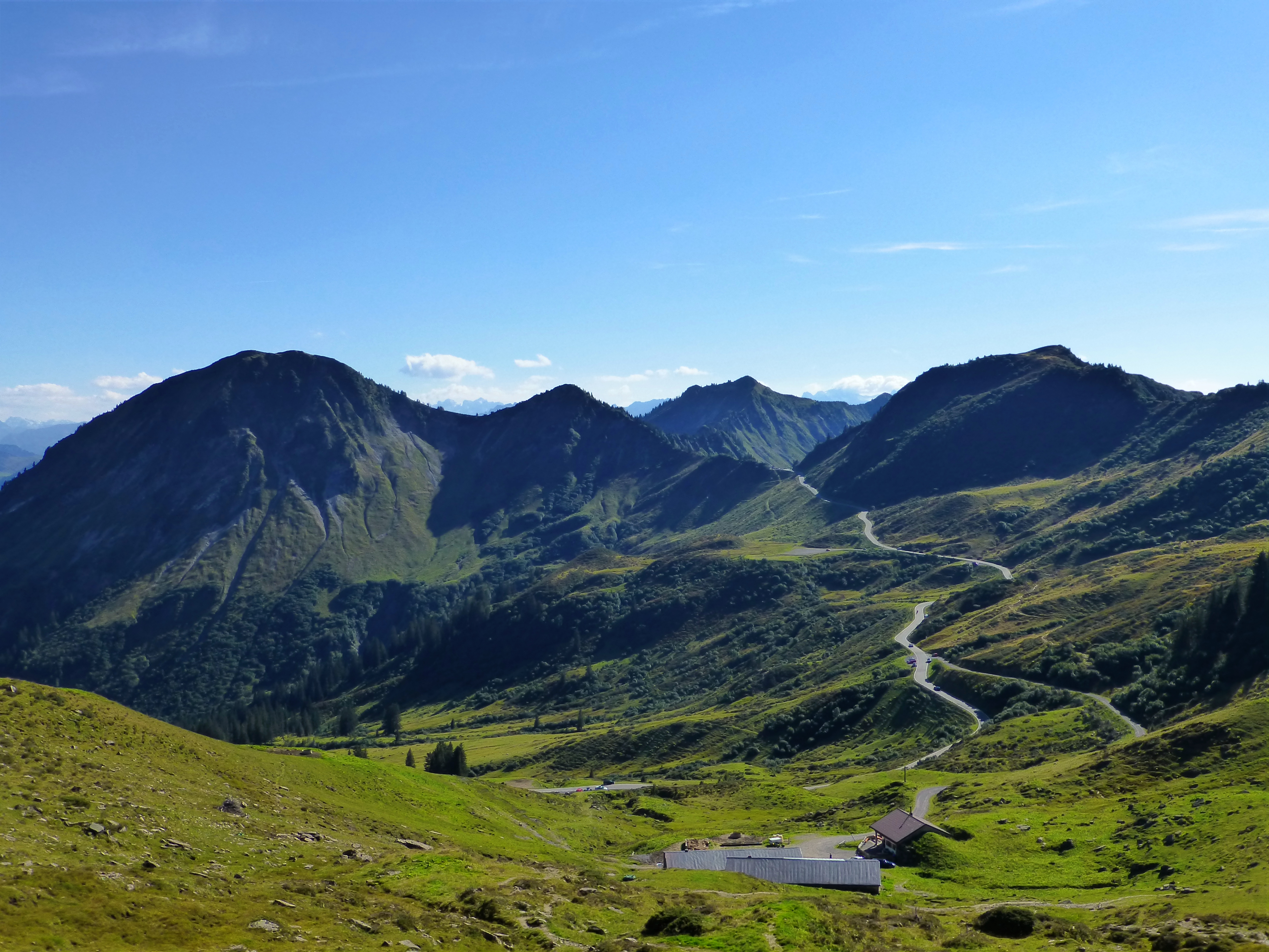 Blick vom Portla Fürkele auf das Furkajoch